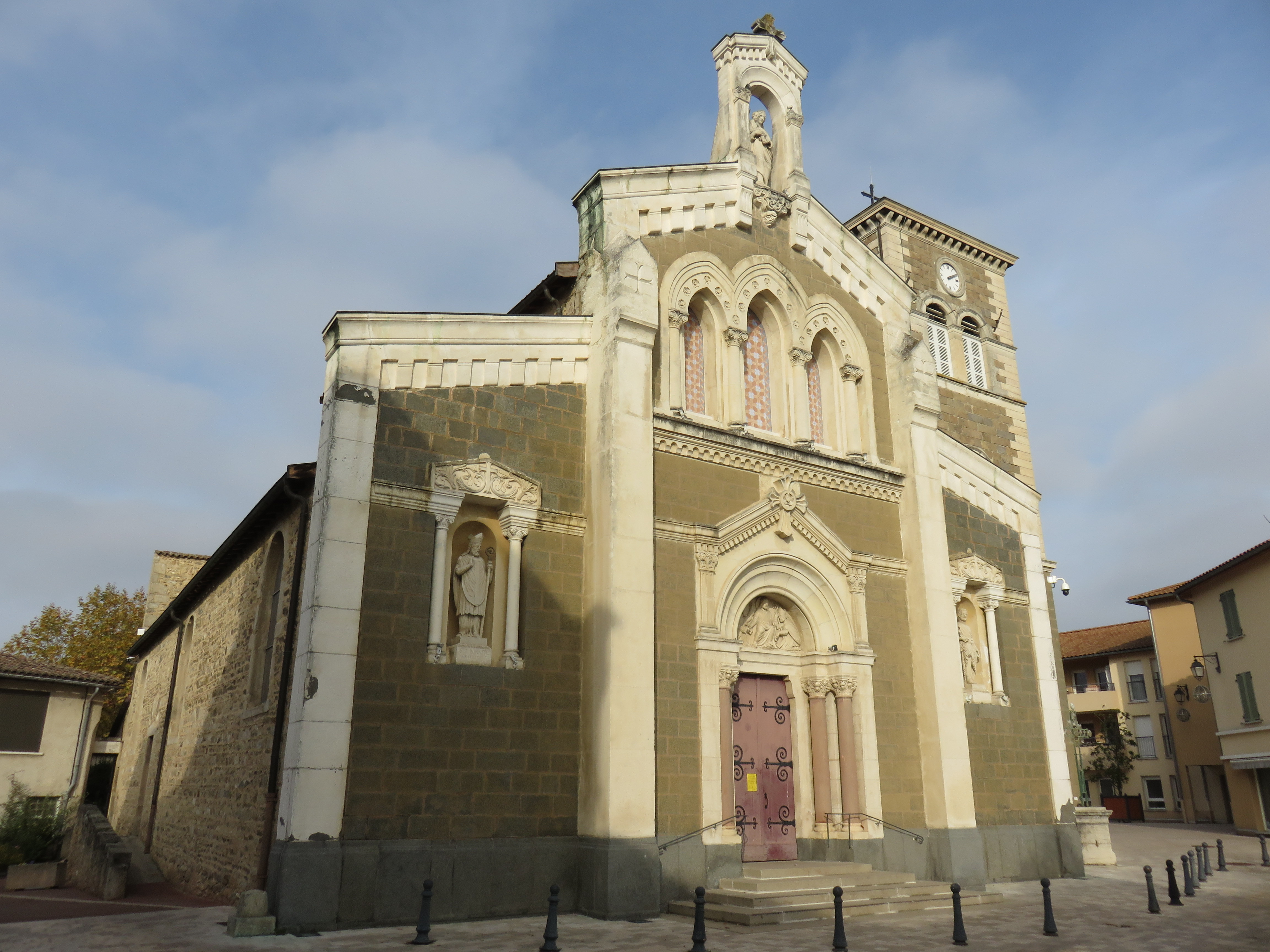 Vue de l'église Saint-Bonnet de Vourles (Rhône, France).